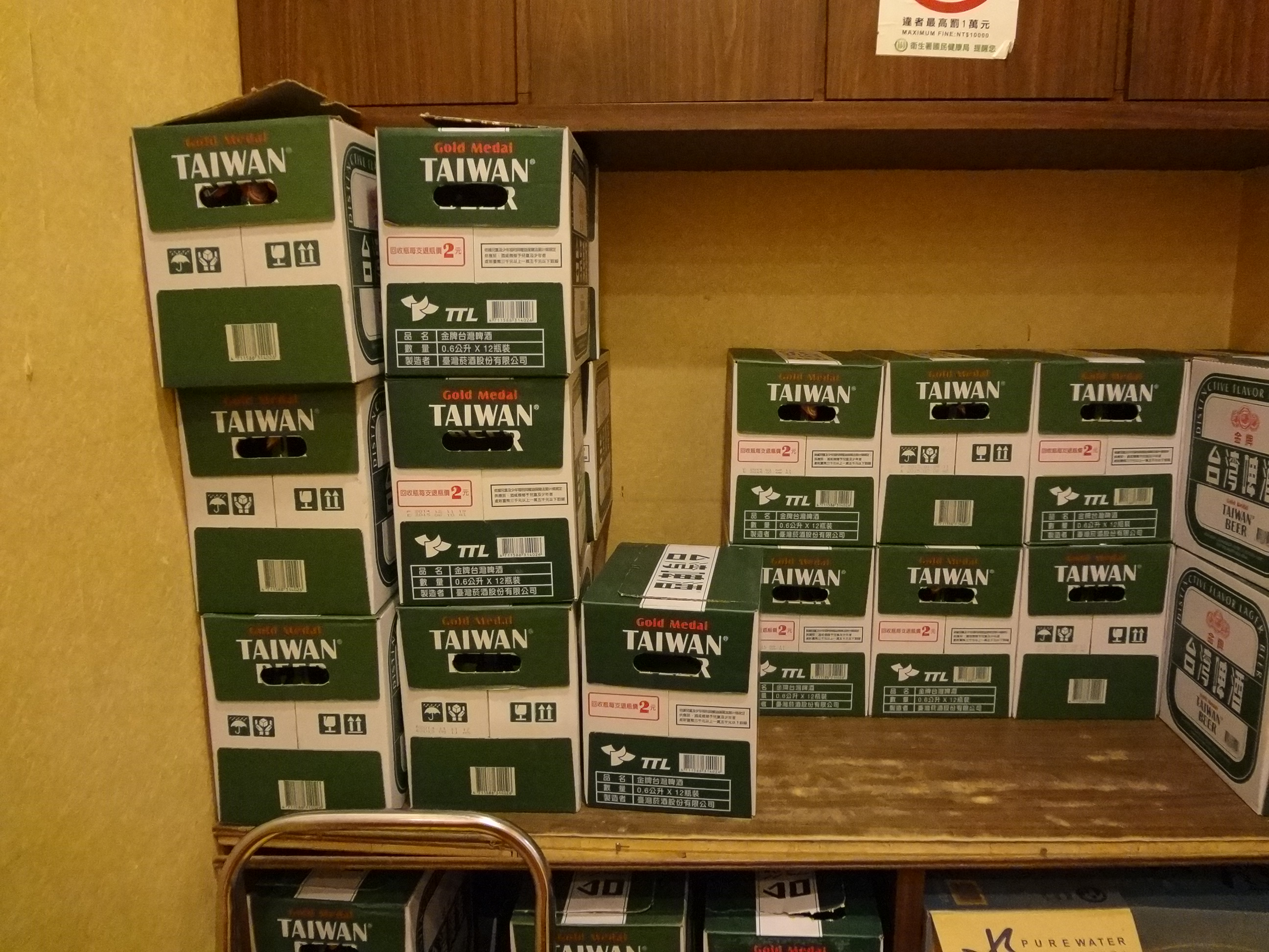 中文（台灣）: 金牌台灣啤酒紙箱堆。